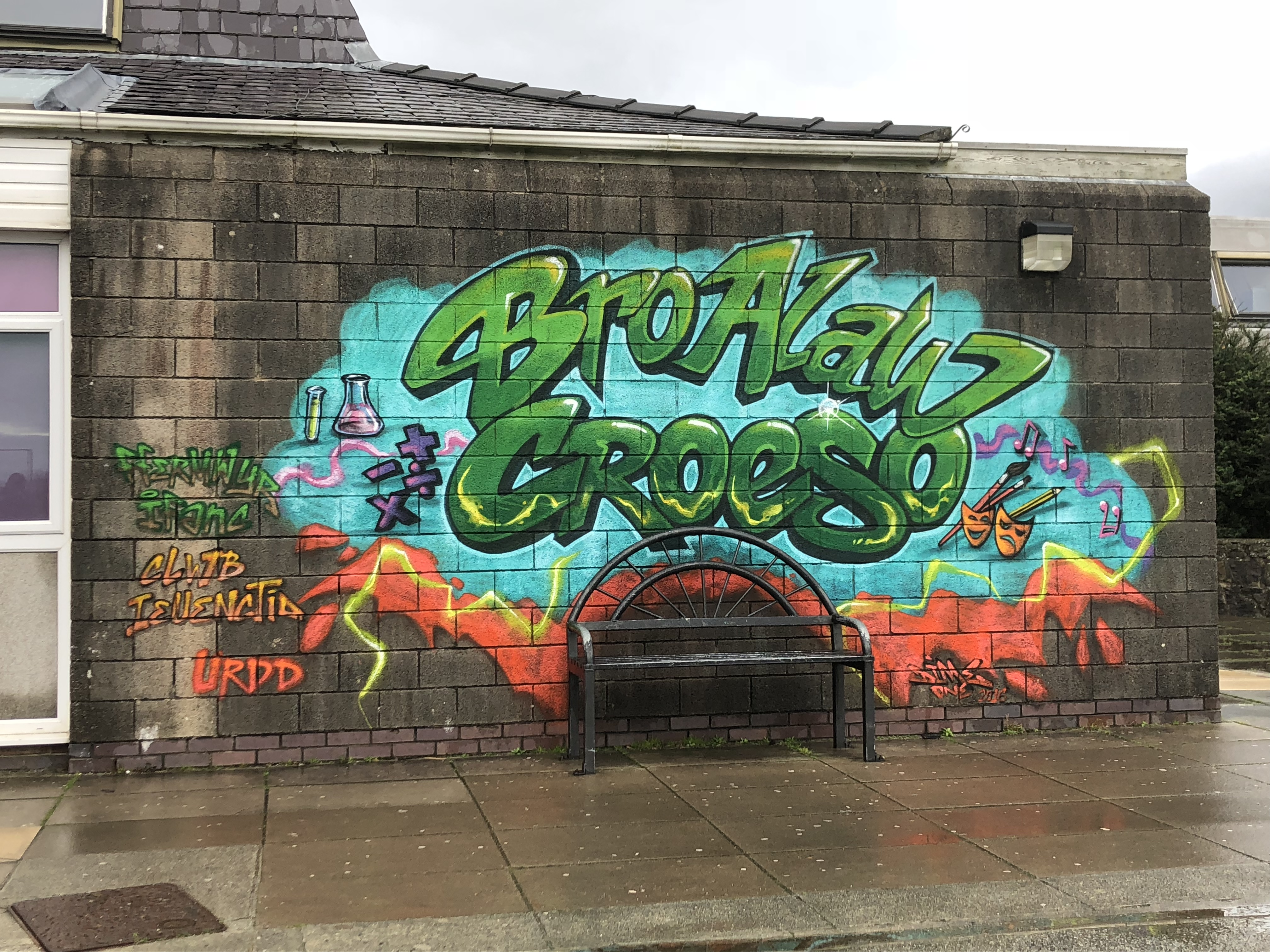 Bro Alaw, Ysgol Uwchradd Bodedern